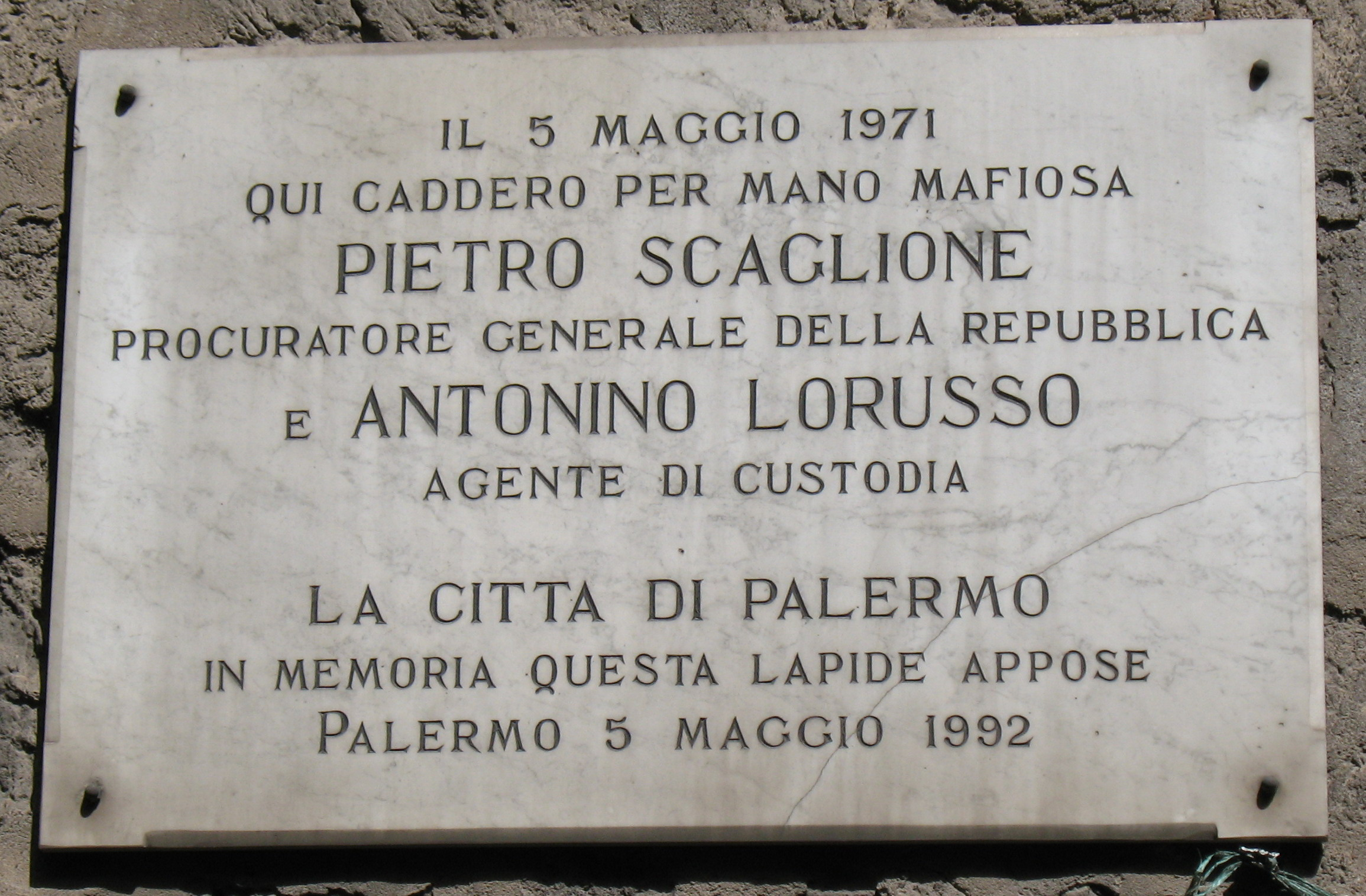 Lapide commemorativa di Pietro Scaglione e Antonino Lorusso (Antonio Lo Russo), vittime della mafia, in via Cipressi a Palermo